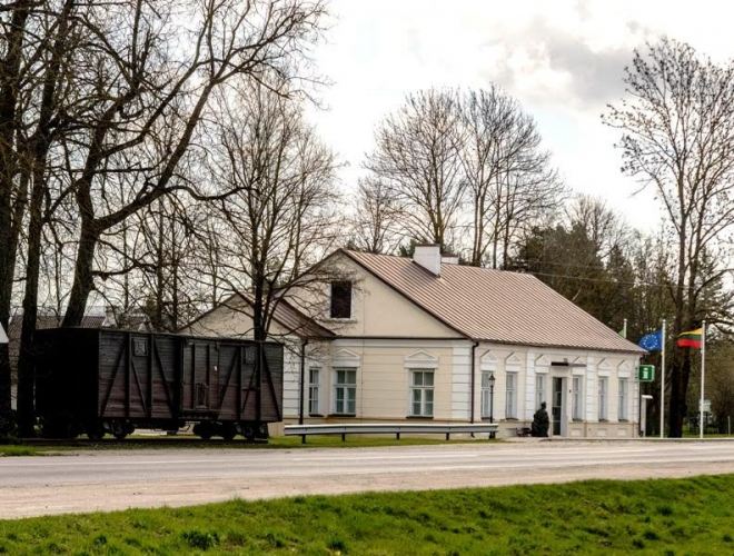 Utena 2